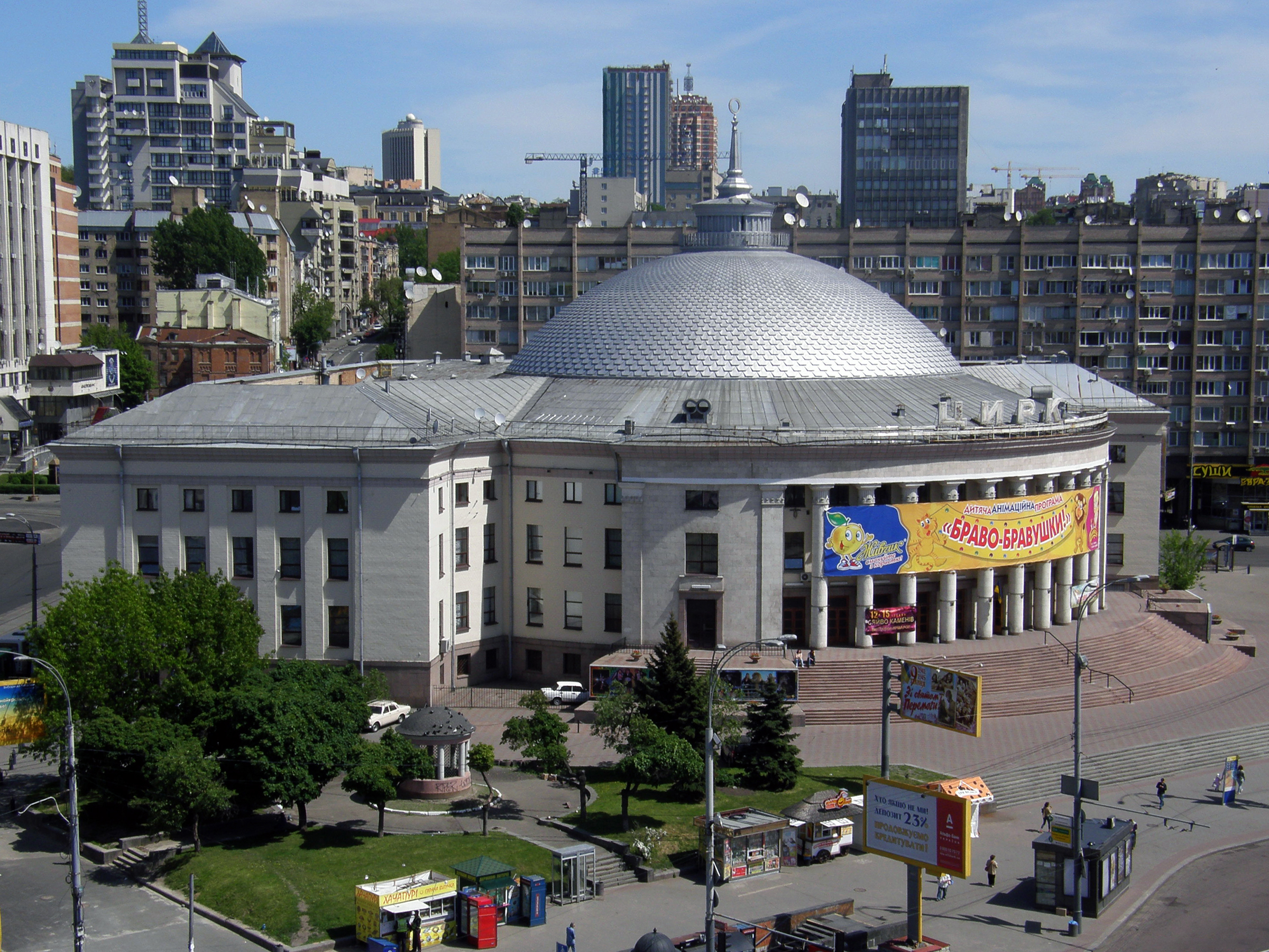 киевский цирк